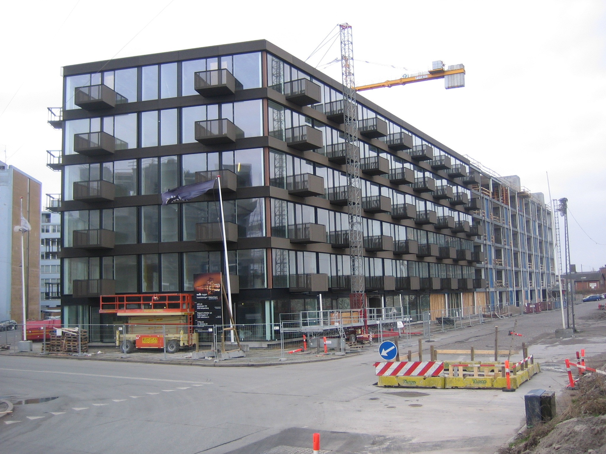 A-huset at Islands Brygge, Copenhagen